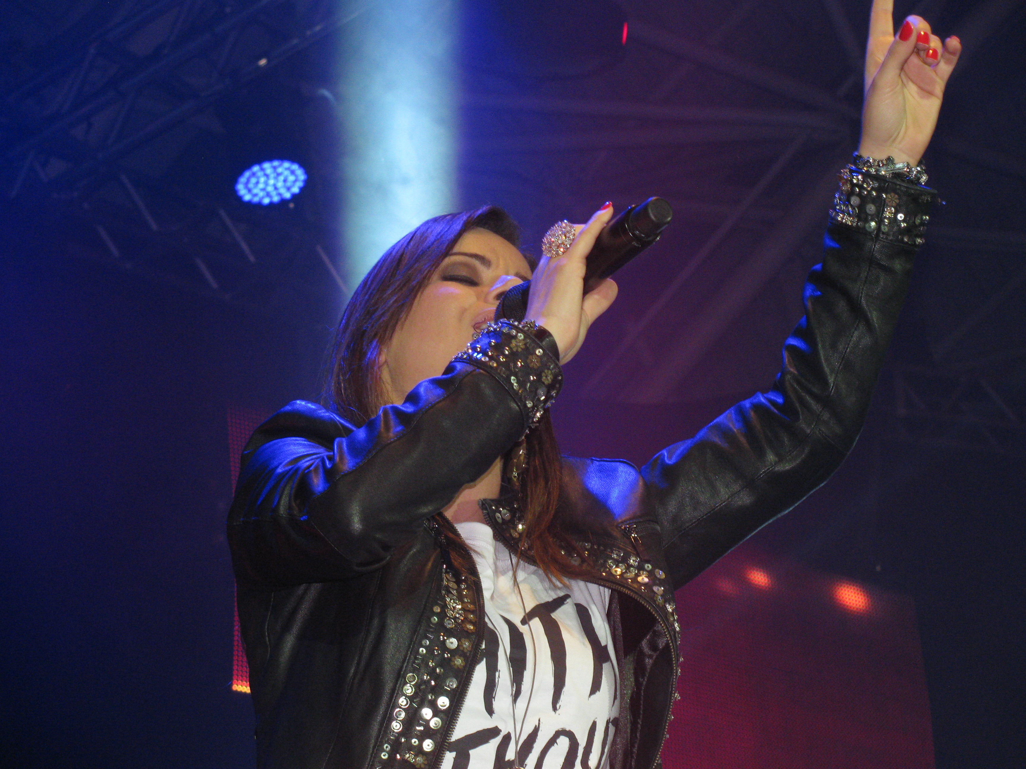 Ana Paula na Conferência Livres